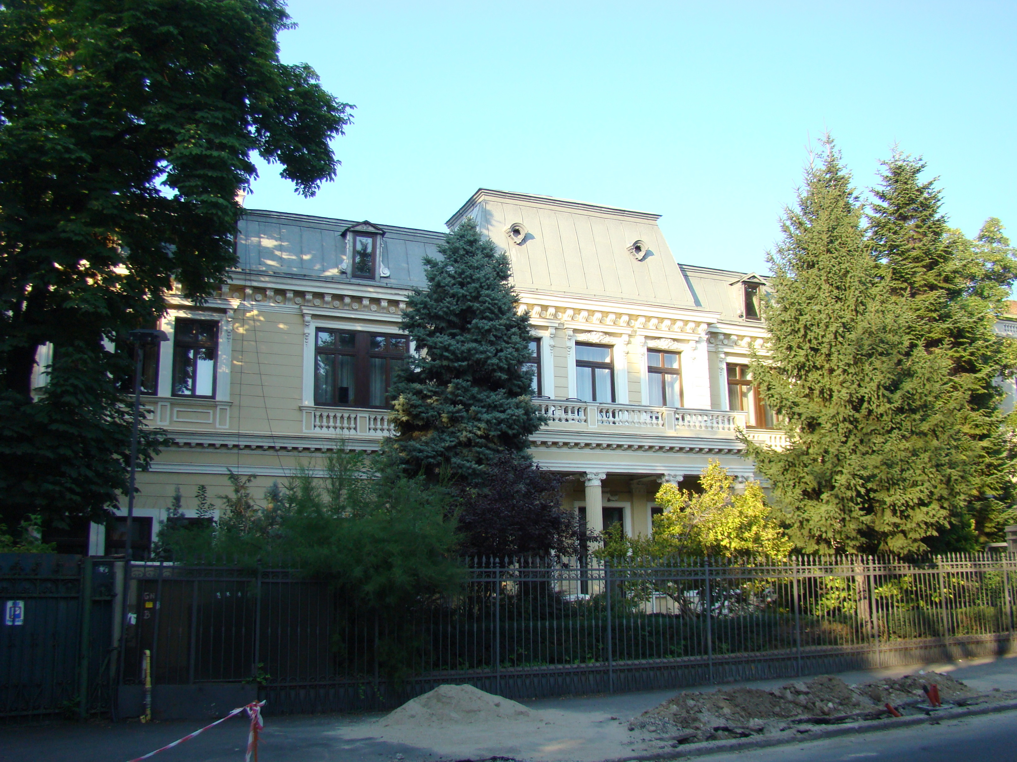 Casă monument istoric, str. Budișteanu, nr.11bis